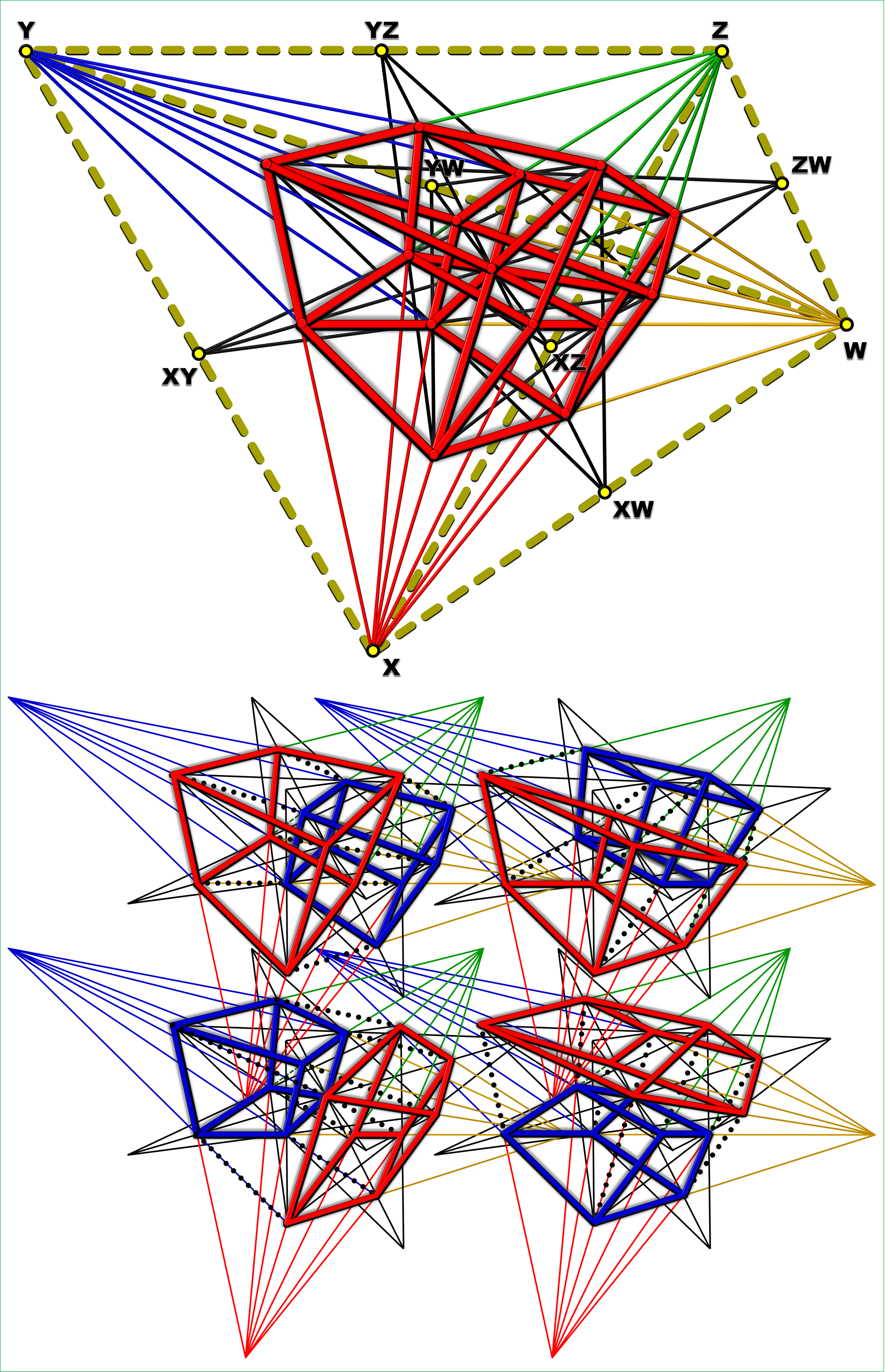 Rappresentazione prospettica del Tesseratto (ipercubo 4D). La figura 4D è proiettata su uno spazio 3D. Il punto di vista, nello spazio 4D, è allineato con i due vertici di una delle diagonali del tesseratto e con il suo centro. In questo caso i quattro punti di fuga delle quattro direzioni degli spigoli dell'ipercubo 4D stanno sui vertici di un tetraedro regolare. Delle due diadonali di ciascuna delle facce quadrate del tesseratto, una sarà sempre parallela allo spazio 3D di proiezione. I punti di fuga delle altre diagonali delle facce quadrate stanno sui punti medi degli spigoli del suddetto tetraedro regolare individuato dai quattro punti di fuga delle direzioni degli spigoli del Tesseratto. Nella figura in basso sono evidenziate, nella stessa rappresentazione prospettica, le quattro coppie di cubi paralleli, che compongono la superficie 3D del Tesseratto 4D.